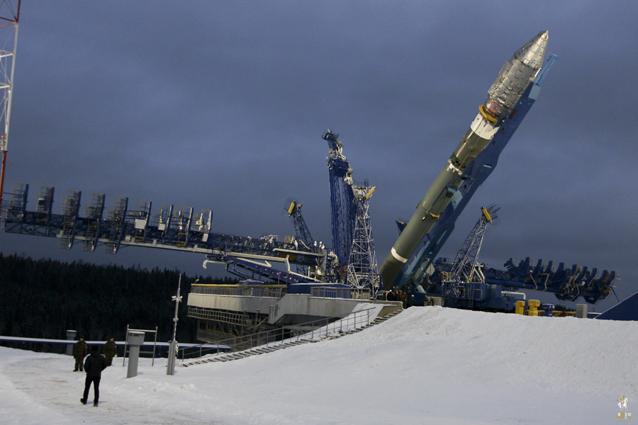 Воздушно-космические силы провели успешный пуск новой ракеты-носителя «Союз-2.1В» с космодрома Плесецк